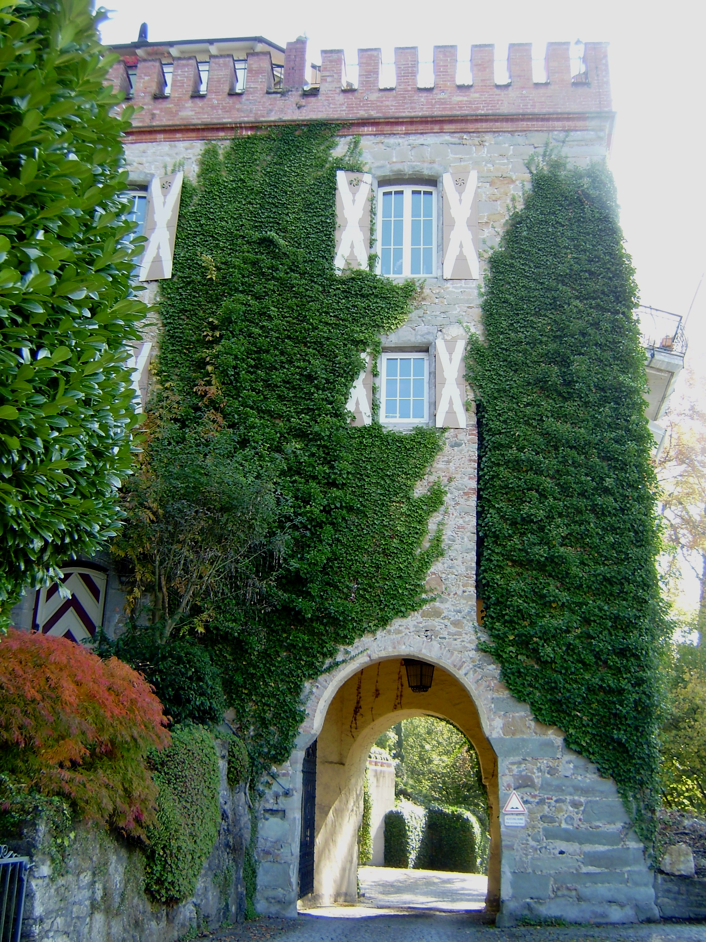 Klausturm in Lochau (Vorarlberg), Klausberg 4; Hofsseite